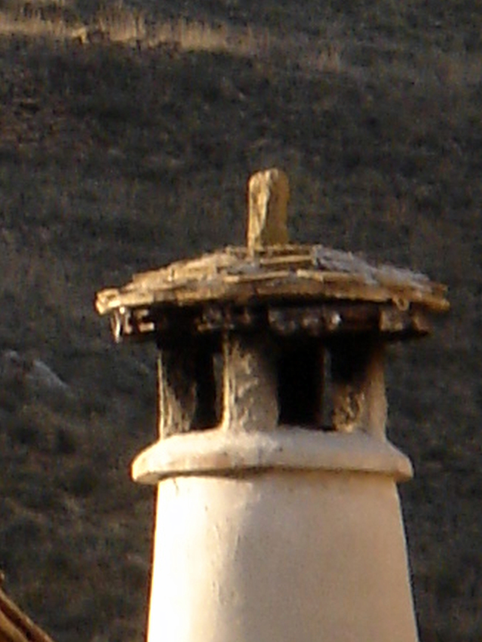 Detalle de un espantabrujas restaurado en Longas